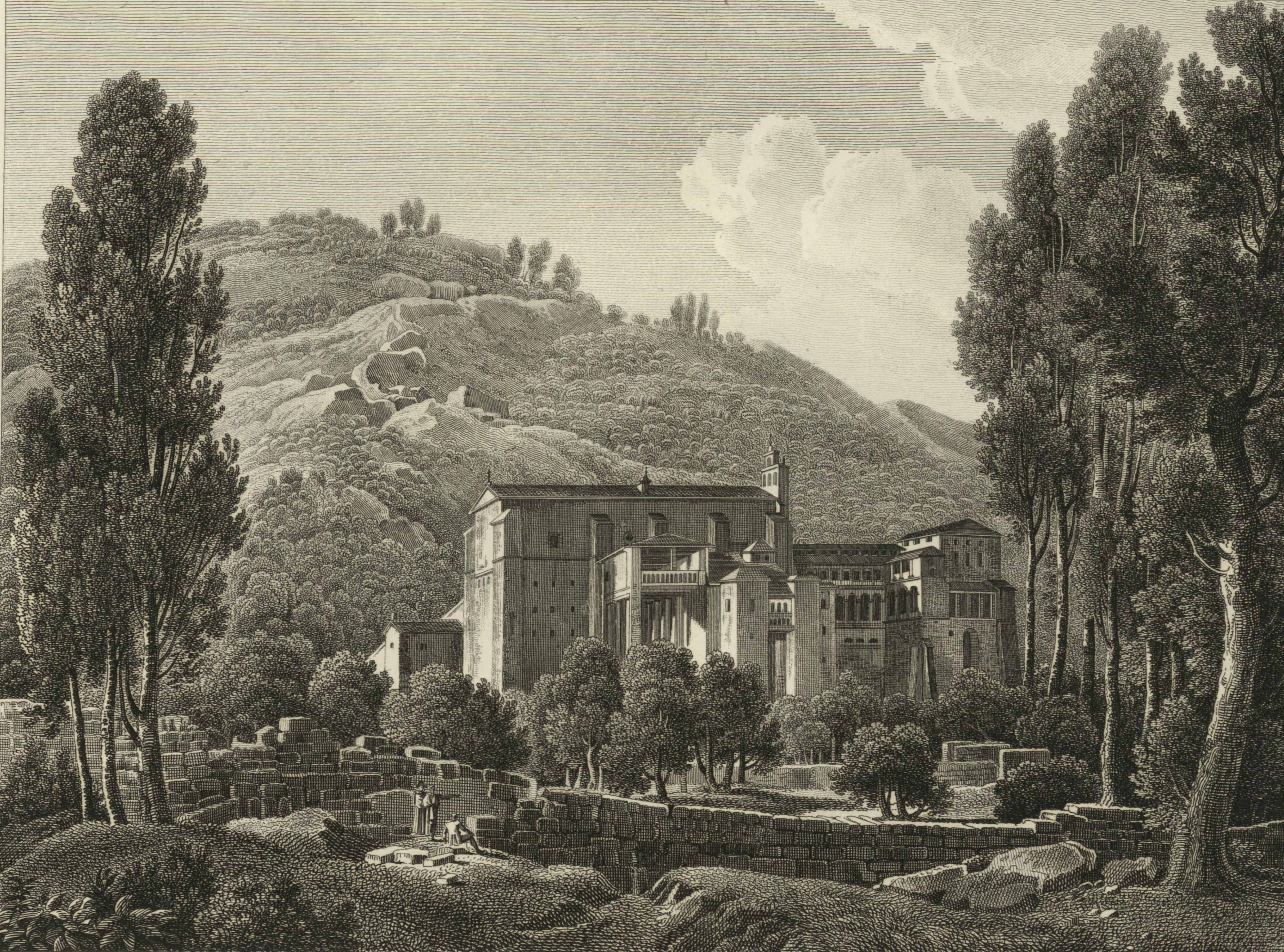 Vista del monasterio de Yuste. Plano del monasterio de Yuste.